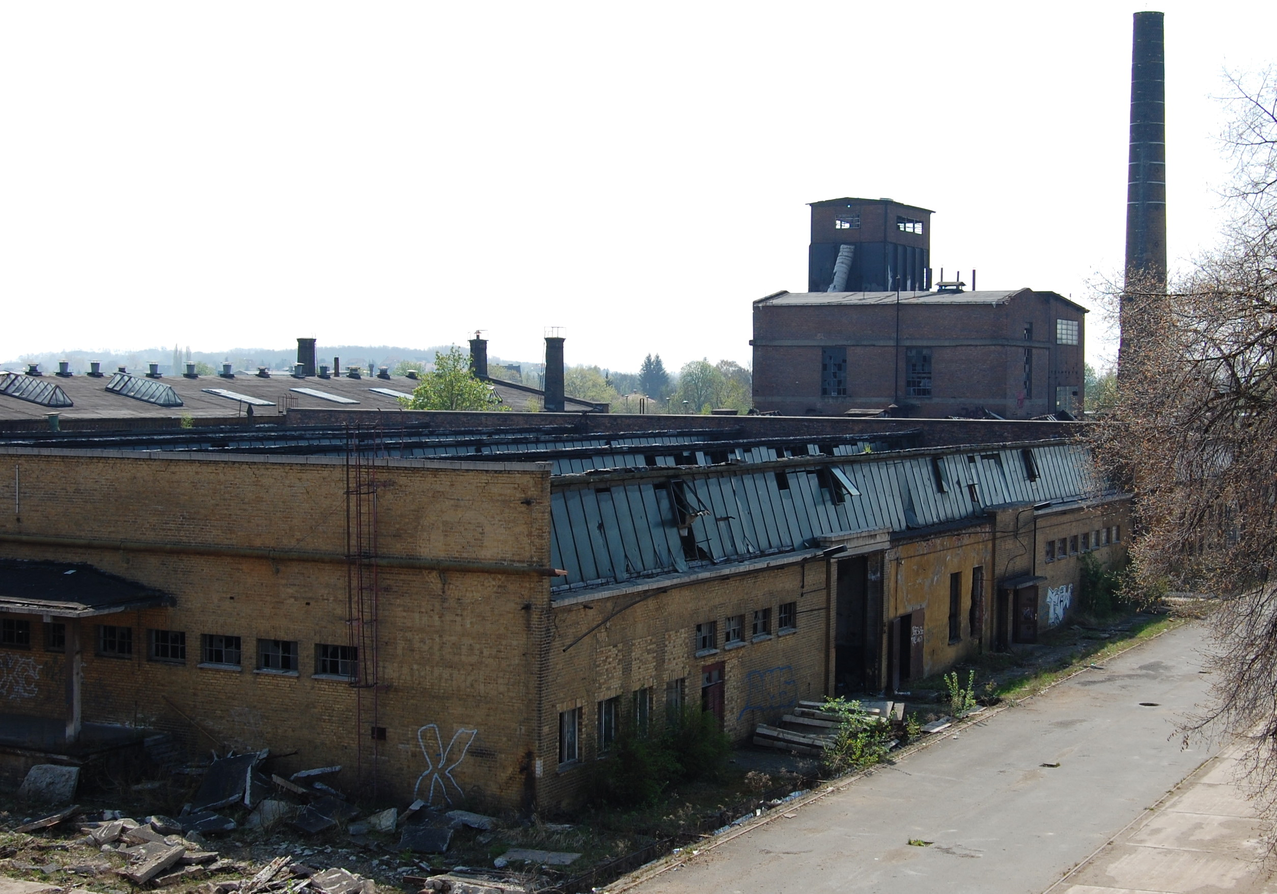 Blick auf die Zentralschmiede, RAW Salbke